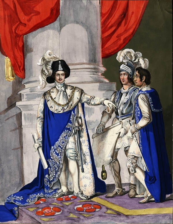 Prinz Carl von Bayern (1795-1875) als Großprior des St. Georg-Ritterordens, zusammen mit einem Kandidaten und einem Ritter. (BSB Porträt- und Ansichtensammlung)